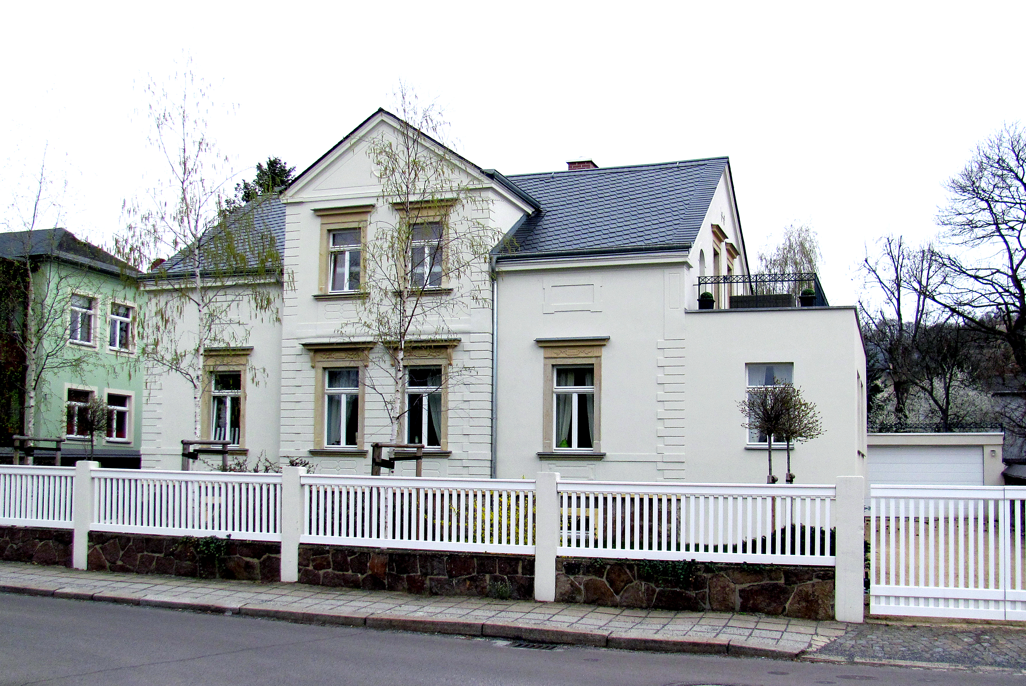 Radebeul, Villa Theodor Clemens Hanke